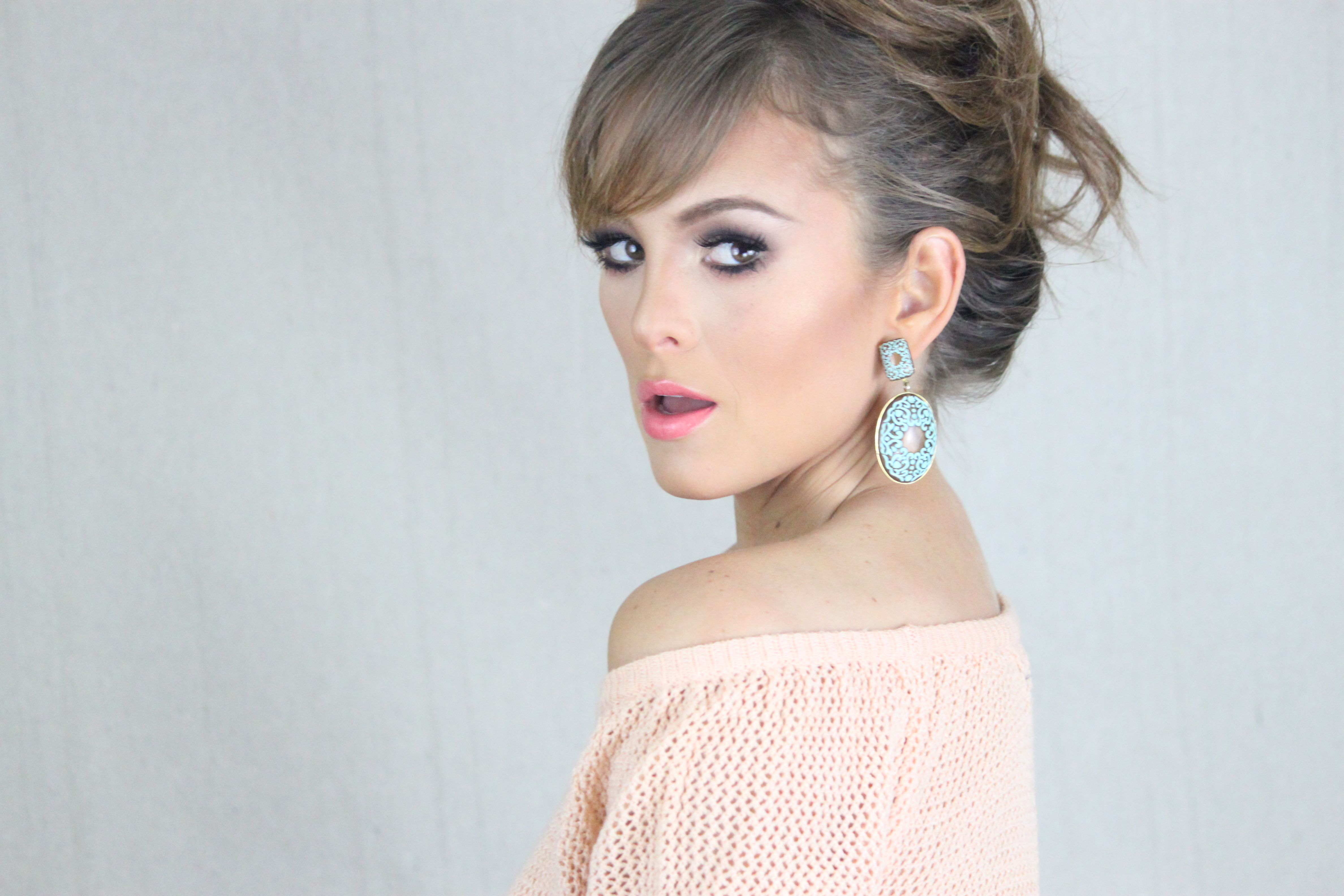 Fotografía Begoña Narváez 2012